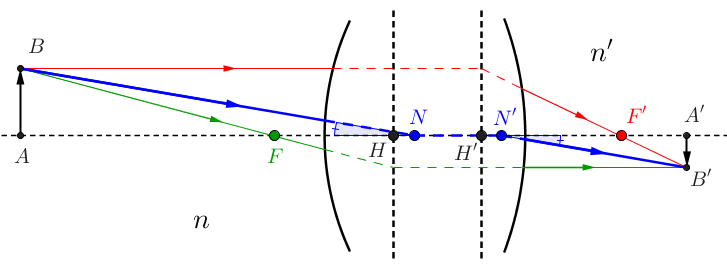 Illustration points nodaux